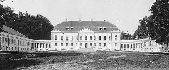 Pałac Wołłowiczów w Świacku koło Grodna. Zdjęcie z 1933 roku.